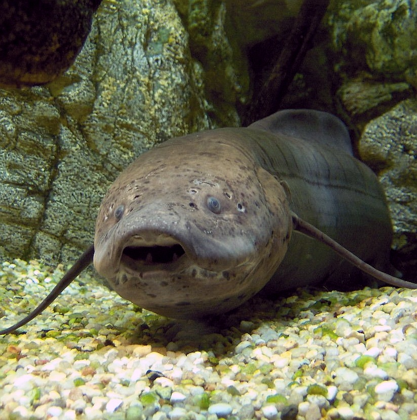 Protopterus annectens at Paris Aquarium